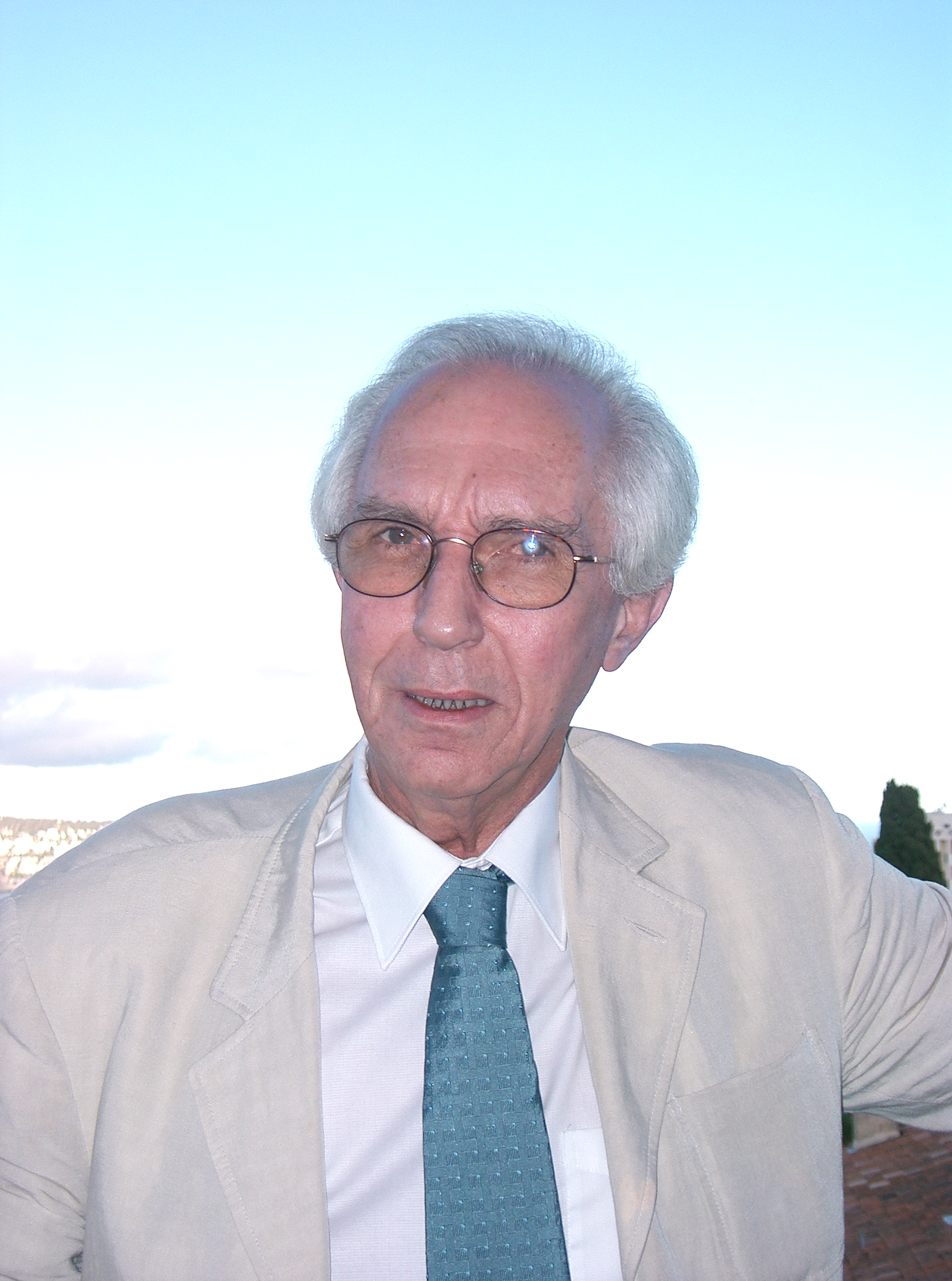 Photo envoyée par Jean-Charles Terrassier pour illustrer sa page Wikipédia